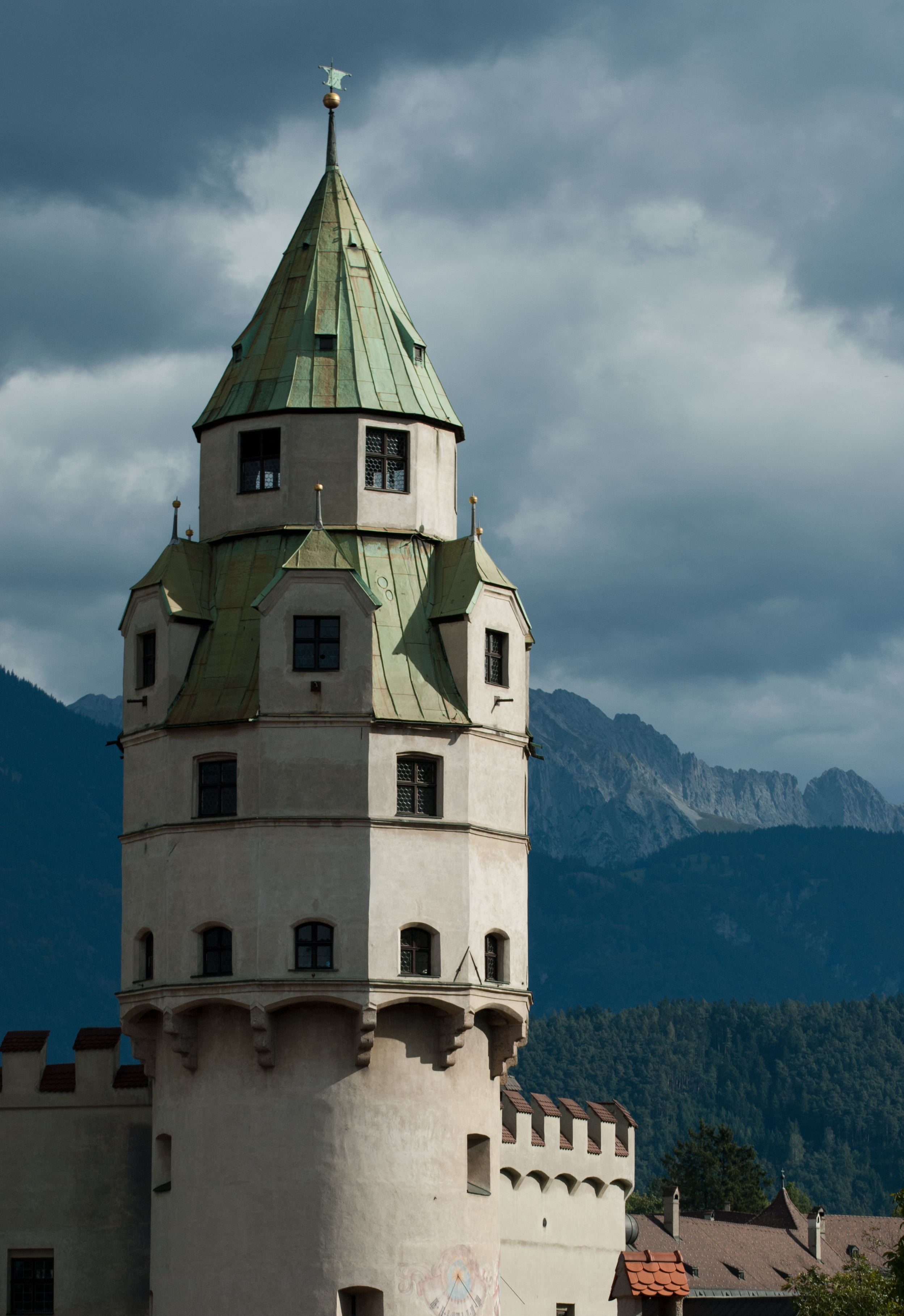 Blick von der Haller Innbrücke auf den Münzturm der Burg Hasegg